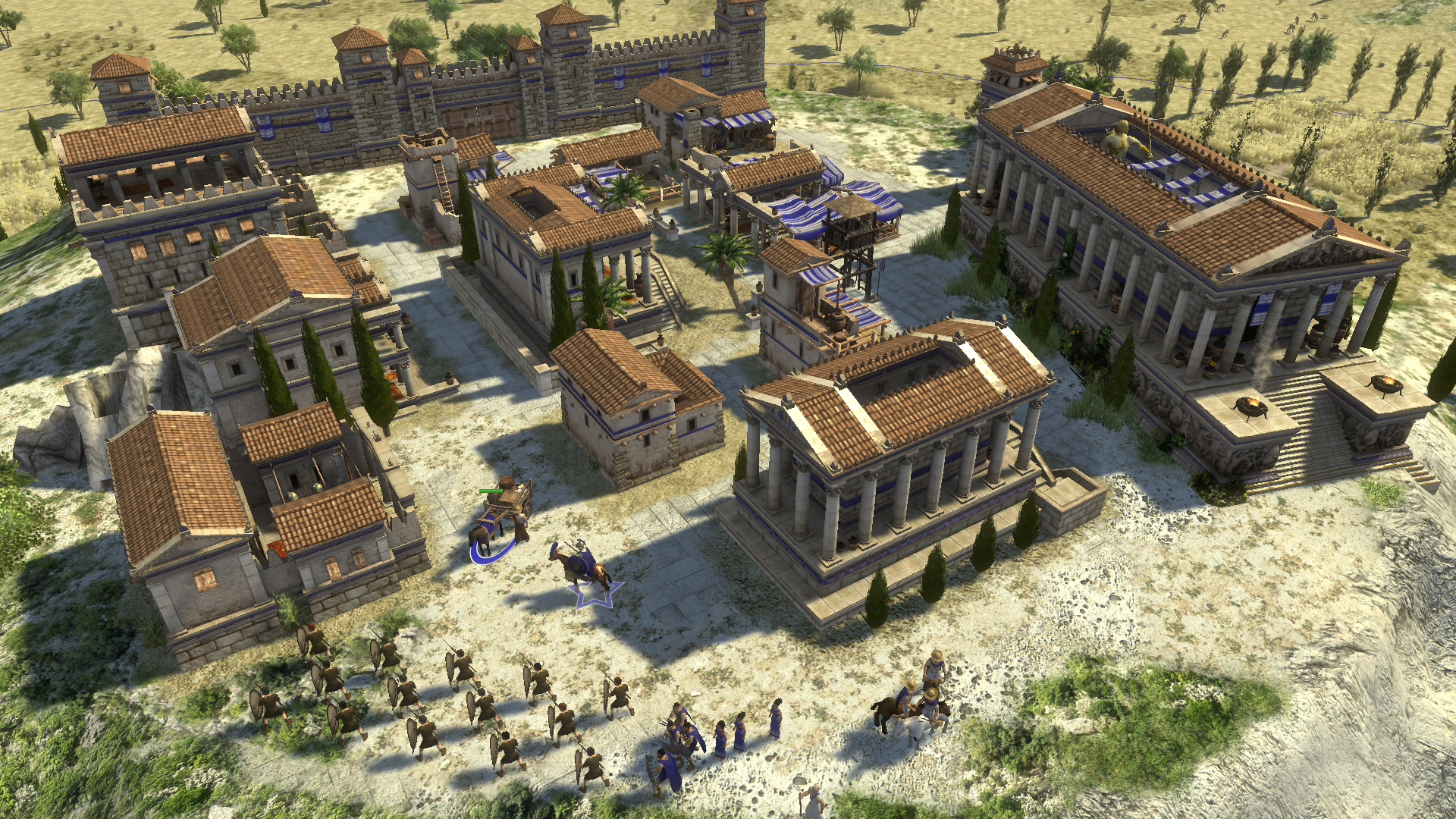 0 A.D. Seleukiden